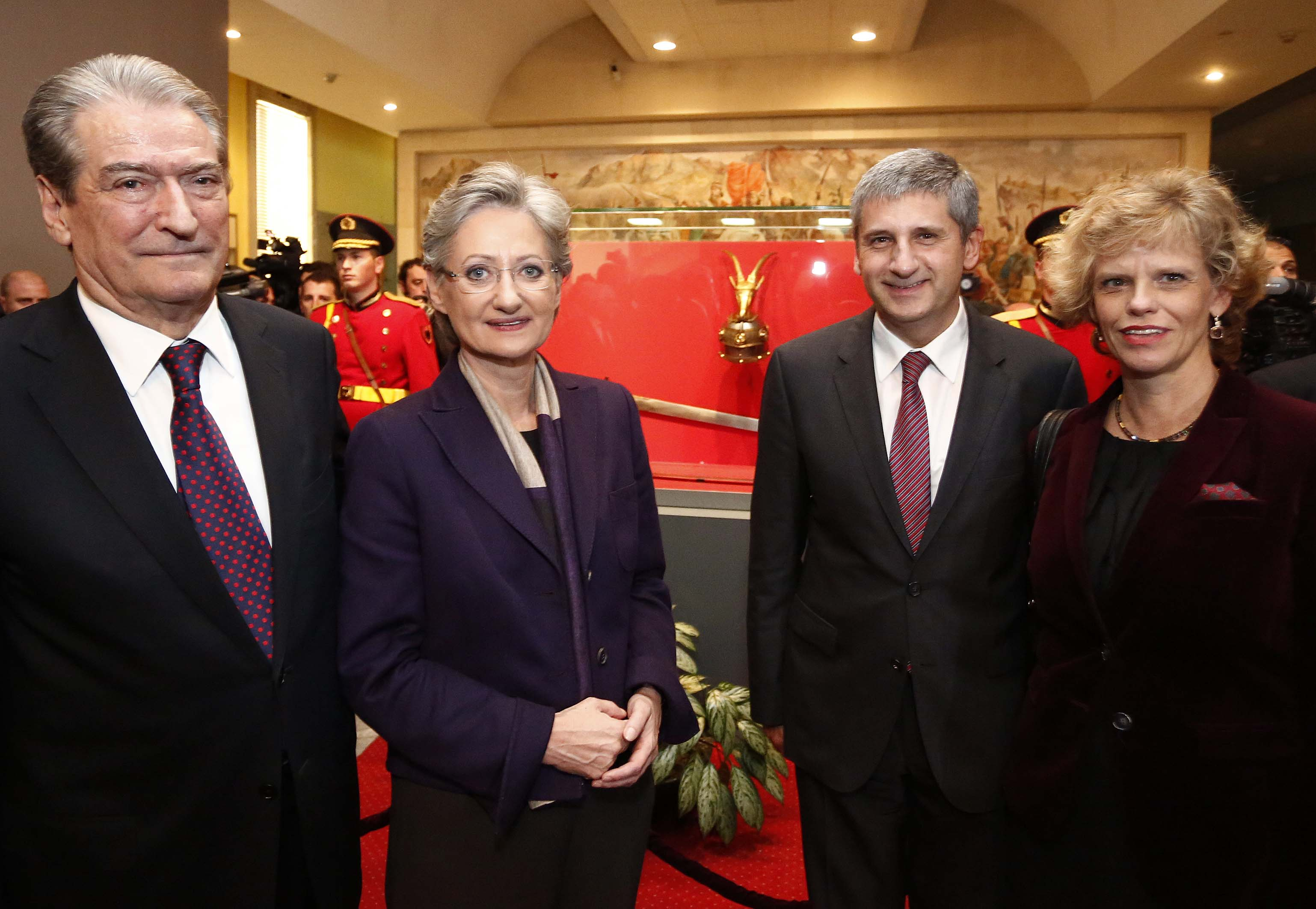 Eröffnung der Skanderbeg Ausstellung durch Außenminister Michael Spindelegger und Bildungsministerin Claudia Schmied, Tirana, Albanien, 22.11.2012. Foto: Dragan Tatic